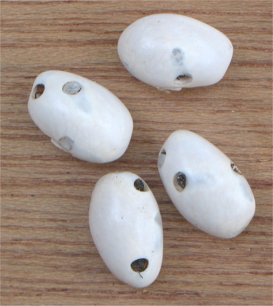 (Bonenkever schade bij sperciebonen) Acanthoscelides obtectus damage